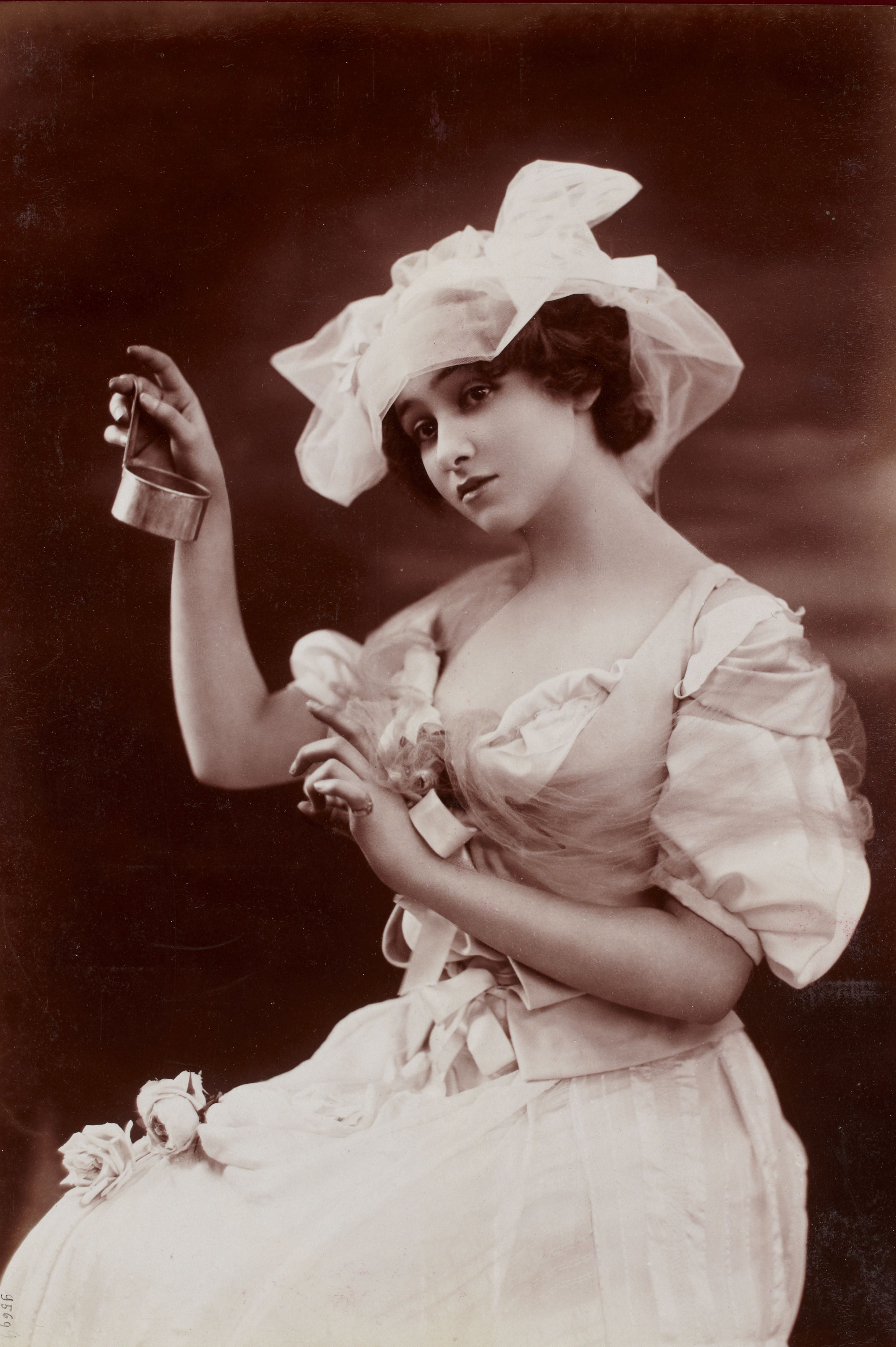 Album Reutlinger de portraits divers, vol. 47 : [photographie positive] : Lilian Greuze.